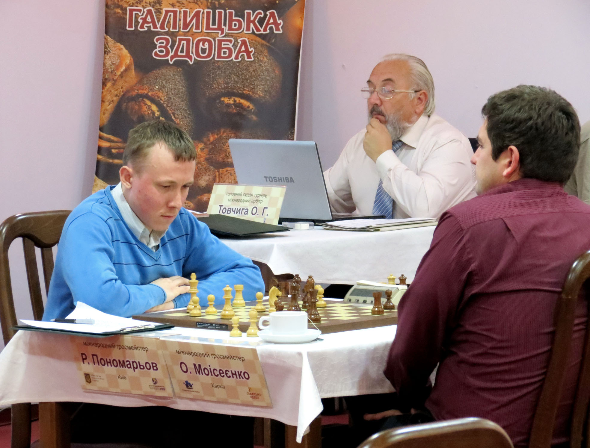 Чемпіонат України 2014 (9 тур) Р.Пономарьов-О.Моїсеєнко, О.Товчига (гол.суддя)